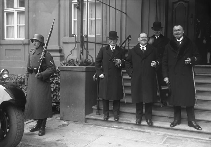 Die feierliche Überreichung der Urkunde zum Ehrenbürger der Stadt München an den Reichspräsidenten von Hindenburg in Berlin! Nach der feierlichen Überreichung der Urkunde verlassen die beiden Bürgermeister der bayerischen Landeshauptstadt München das Reichspräsidentenpalais in Berlin. v.li.n.re.: der bayerische Gesandte in Berlin von Praeger, die beiden Münchener Bürgermeister Dr. Scharnagel und Dr. Küfner, dahinter Minister a.D. Dr. Schätzel.